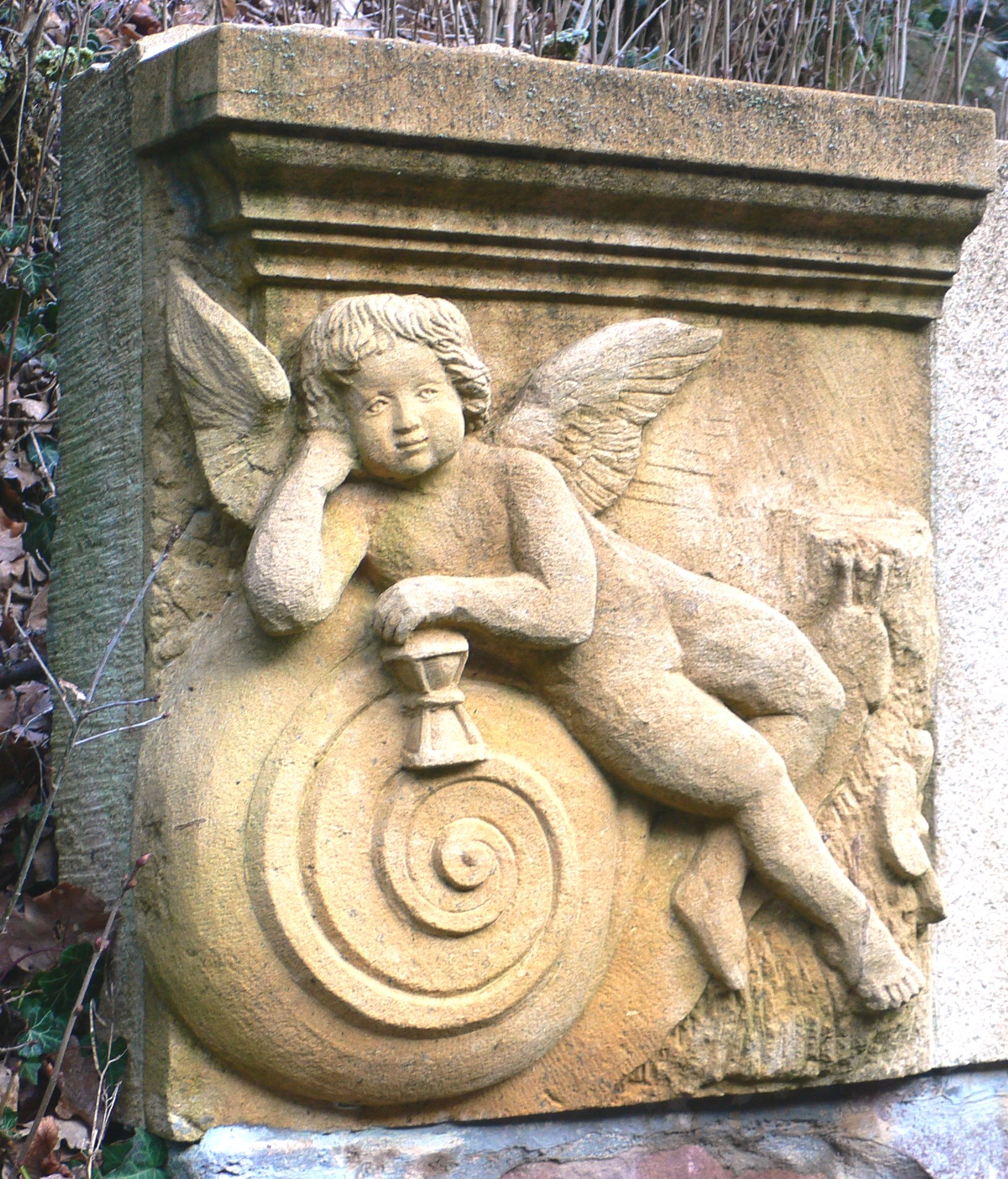 Teil eines Wegweisers zur Lorettokapelle in Murbach (Elsass), Herkunft und Alter der Spolie unbekannt